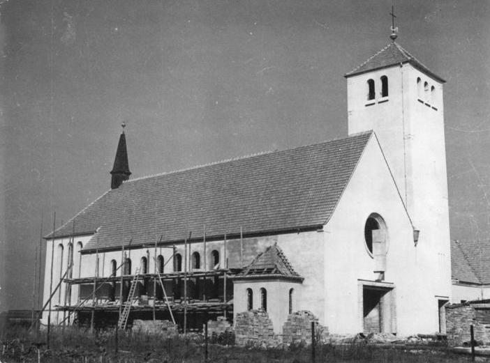 Dessau, Neue Kirche Zentralbild Klein 17.10.1953 Vom neuen Dessau Dessau ist eine Industrie-Stadt, deren Entstehung in die Zeit um 1180 zurückreicht. Sie wurde wie viele andere Städte unserer Heimat ein Opfer des Bombenterrors im 2.Weltkrieg. Der 7.März 1945 ist der schwärzeste Tag in der Geschichte der Stadt. Dessau musste einen schweren Luftangriff über sich ergehen lassen und wurde zu über 80% zerstört. In der Nazizeit wurde die Stadt zu einem Rüstungszentrum der Faschisten. Sie erlebte damals eine Scheinblüte des industriellen Aufschwungs. Doch bald zeigte sich, wohin dieser Irrweg führte, nämlich geradewegs zum 7.März 1945. Nach der Befreiung unserer Heimat vom Faschismus durch die Armee der Sowjetunion wurde, wie viele andere Städte, auch Dessau zu einem Bauplatz der friedlichen Arbeit für ein besseres Leben. Bereits 1951 und 1952 sind in der Zerbster Strasse hunderte neue Wohnungen errichtet worden. Durch die neuen Maßnahmen unserer Regierung wird der Wohnungsbau nun in weit grösserem Maße durchgeführt. Gemeinsam schaffen die Bevölkerung und die Verwaltungsorgane an dem Ziel, die alte, im Kriege zerstörte Stadt schöner denn je wieder aufzubauen. UBz: Die neuerbaute Kirche in Dessau-Süd. Sie wird in Kürze ihrer Bestimmung übergeben werden können. Information added by Wikimedia users.Kath. Pfarrkirche Heiligste Dreieinigkeit, Heidestr. 318, Dessau